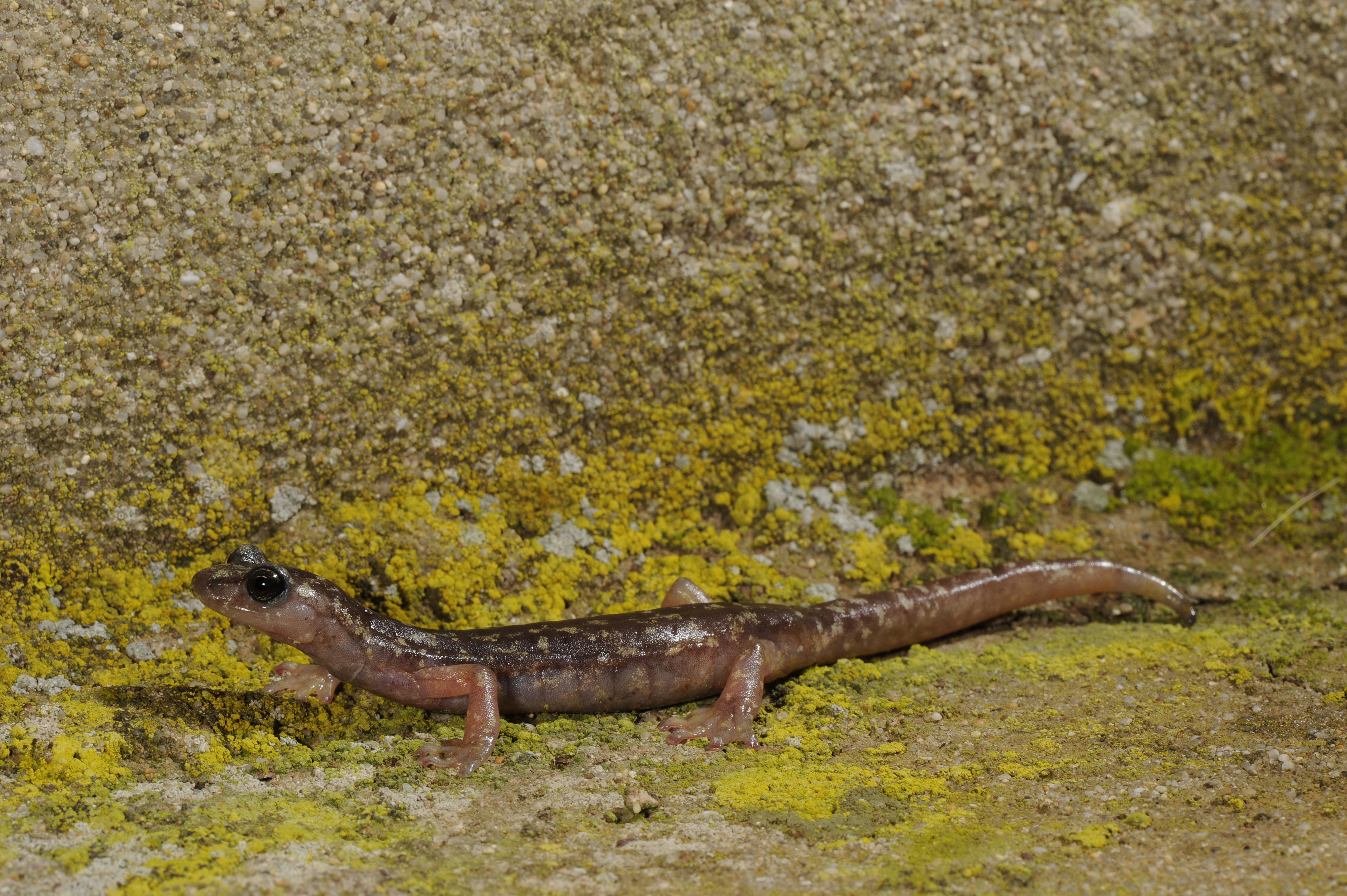 Sàrrabus-Höhlensalamander (Speleomantes sarrabusensis) von Sardinien